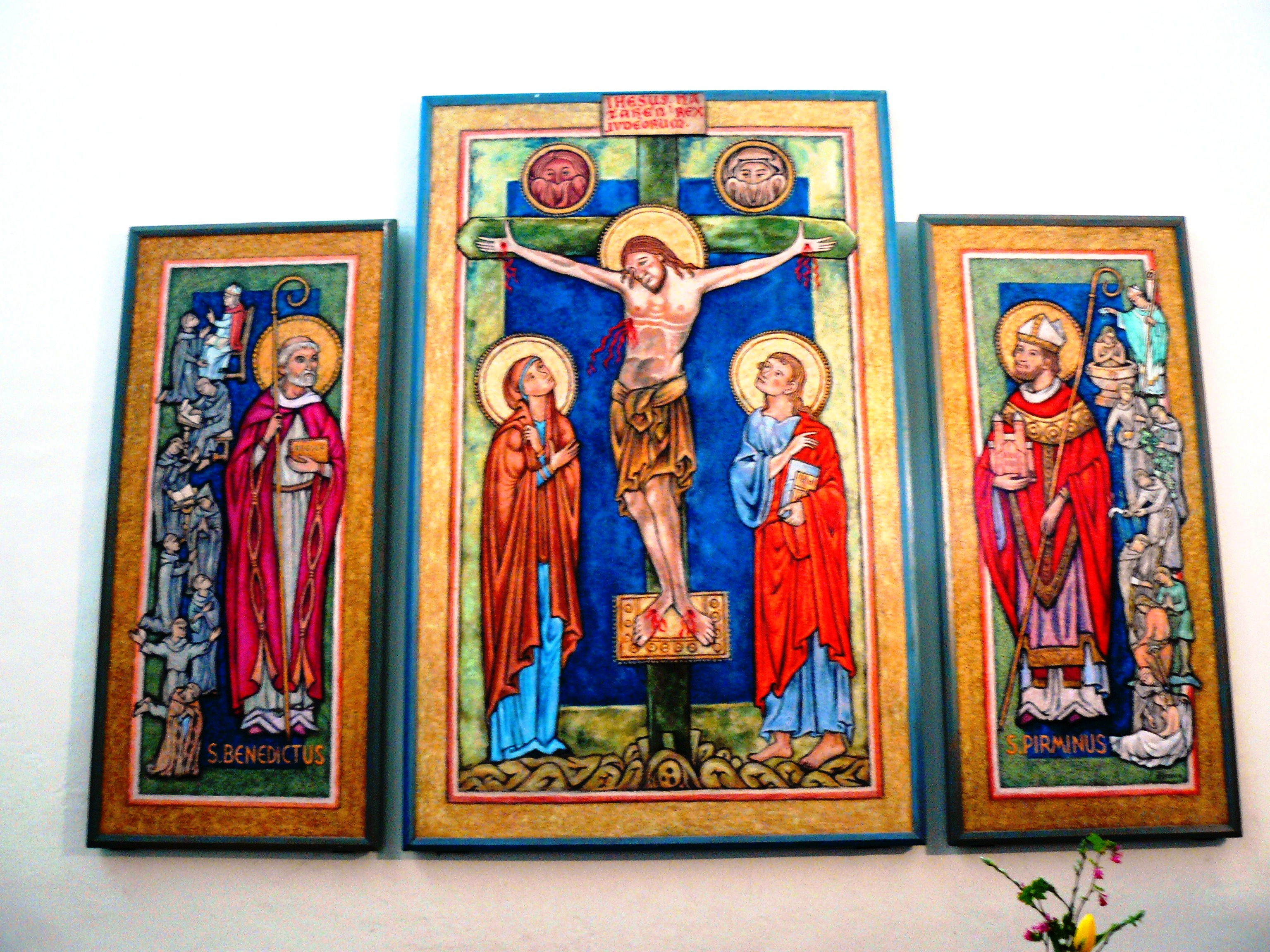 Murbach 012.JPG